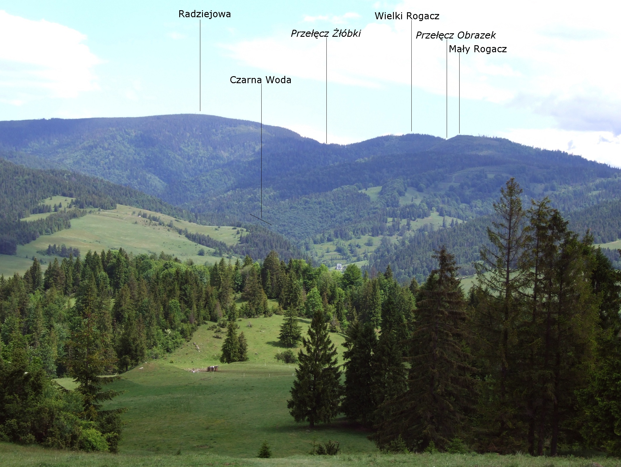 Widok z Małych Pienin (polana Czerszla pod Schroniskiem pod Durbaszką)